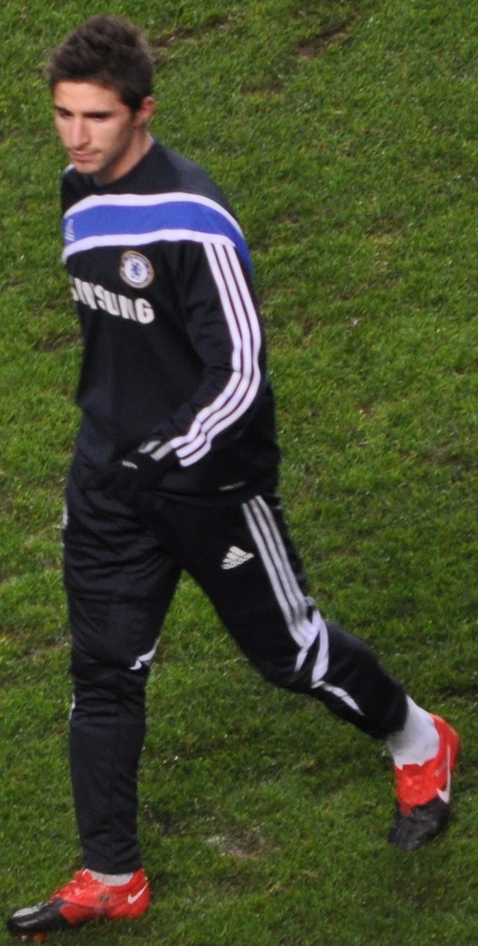 Fabio Borini 2010